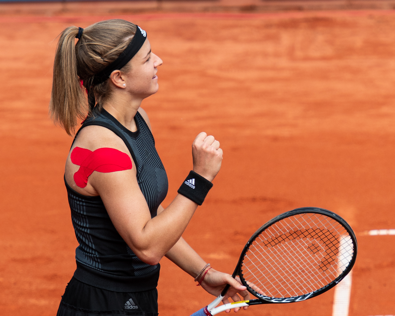 Karolína Muchová